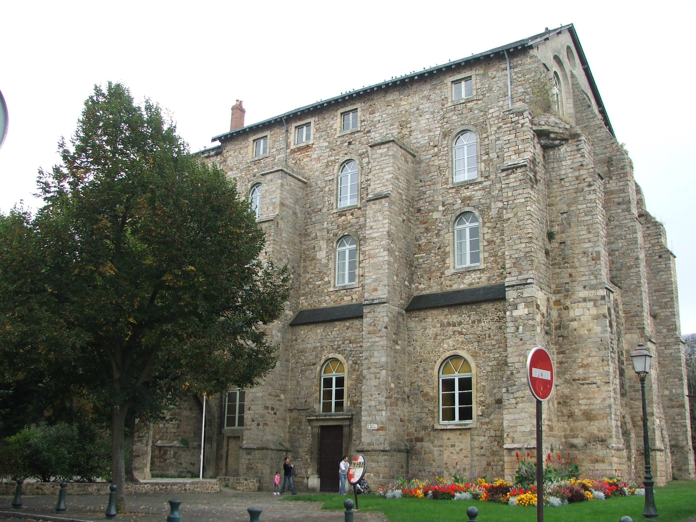 La façade sud-ouest de la collégiale Saint-Pierre la cour au Mans, entre les quartiers Saint-Nicolas, Plantagenêt et les Halles.